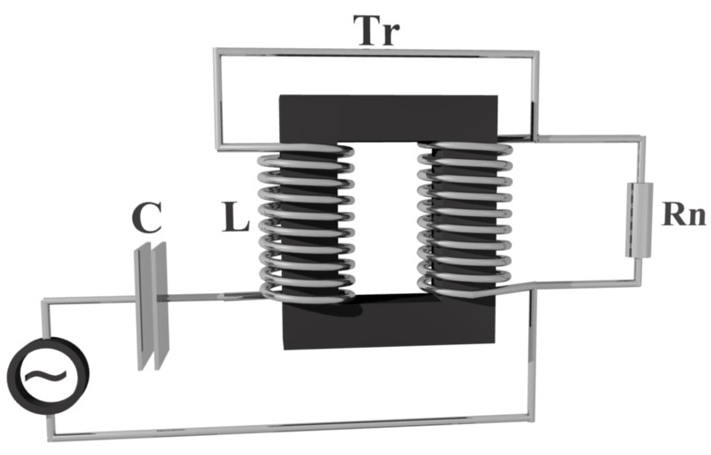 Последовательный резонанс на трансформаторе